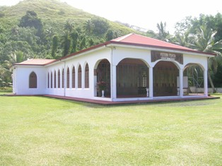 Eglise Catholique de Faaone